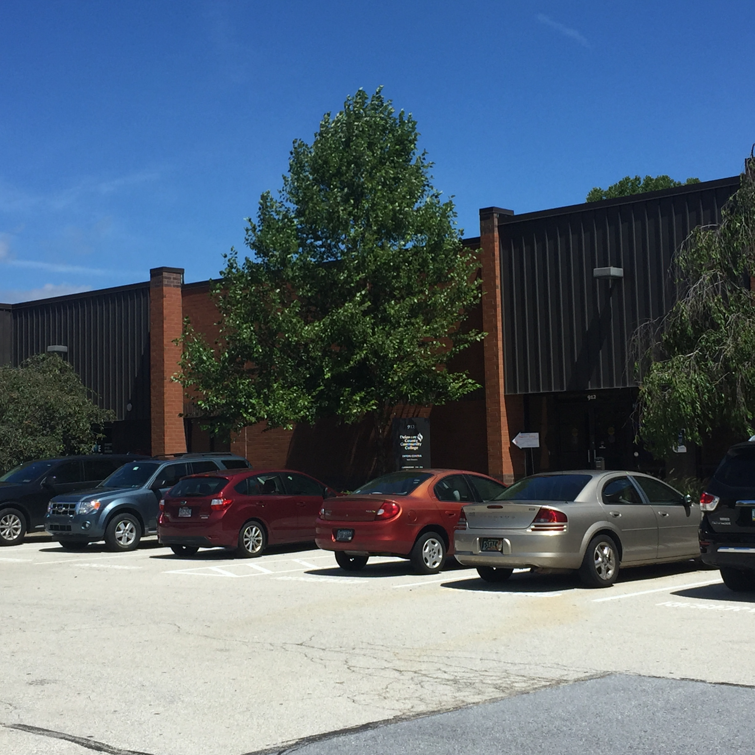 DCCC Exton campus